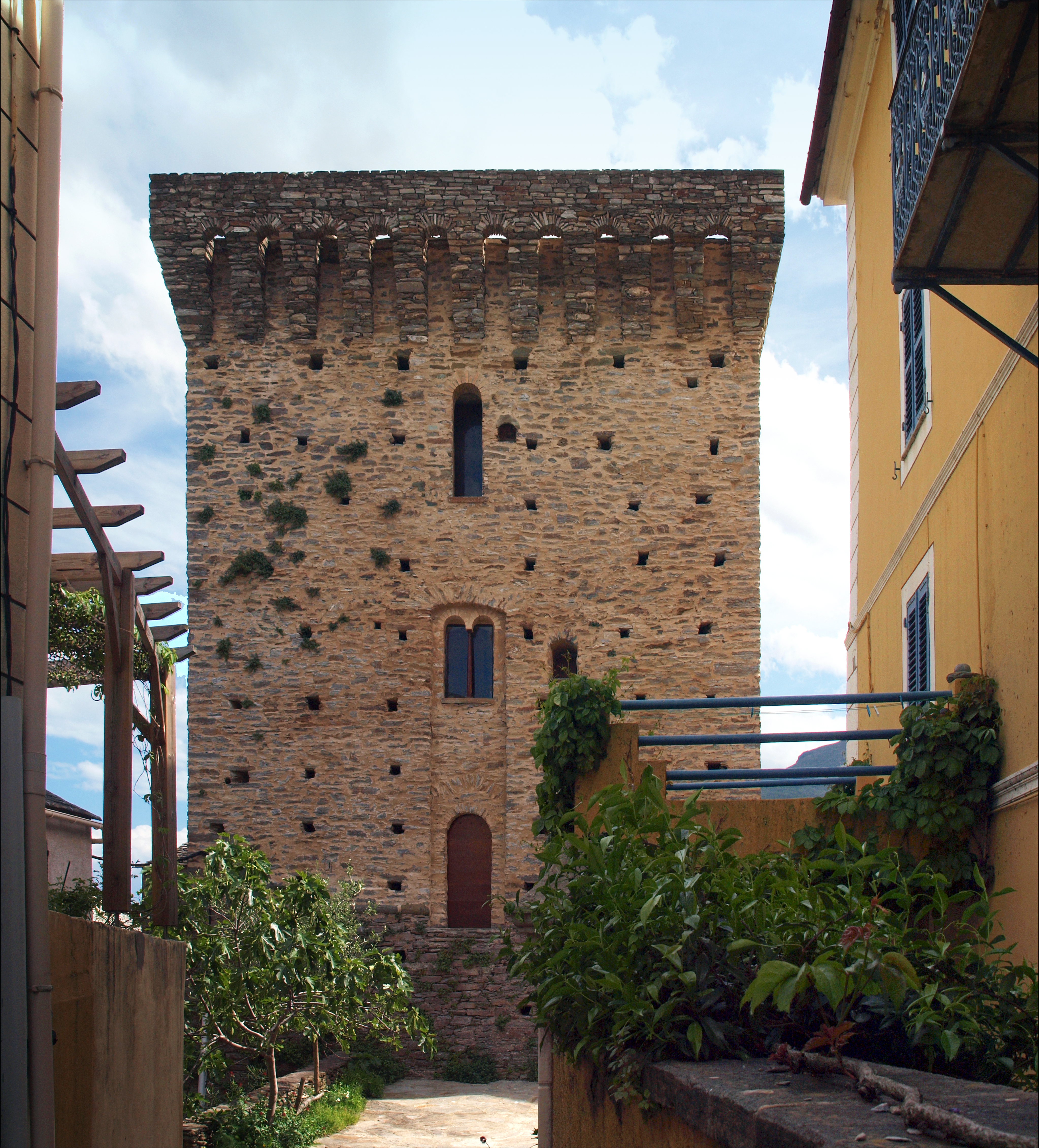 Pietracorbara, Cap Corse (Corse) - Tour d'habitation d'Orneto